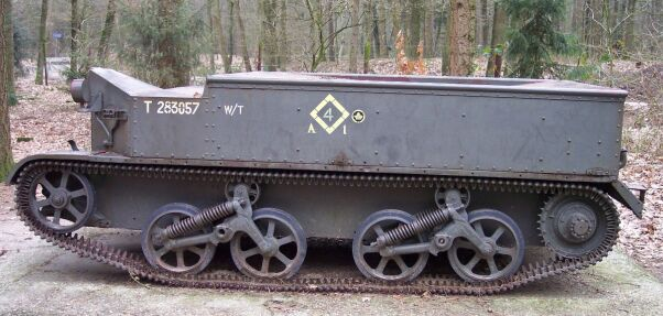 Amerikanische Selbstfahrlafette aus britischer Produktion (Bren Carrier) aus dem 2. Weltkrieg